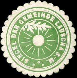 Sealing stamp Title: Siegel der Gemeinde Lauscha S.-M. Description: grün, weiß, geprägt Place: Lauscha size: 4 cm